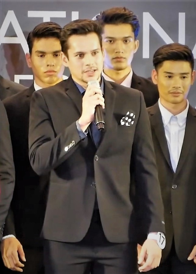 SMART LIVE : หนุ่มเควิน-อภิสิตธ์นันท์ คว้ามง Mister Supranational Thailand 2018 ฟินกันทั้งเวทีเลยล่ะค่ะ สำหรับเวทีการค้นหาหนุ่มหล่อ กับการประกวด Mister Supranational Thailand 2018 งานนี้ หนุ่มลูกครึ่งไอร์แลนด์ เควิน อภิสิตธ์นันท์ ดาโสม คว้ามงกุฏไปครอง พร้อมทำหน้าที่เป็นตัวแทนประเทศไทยเพื่อเข้าร่วมประกวดบรเวทีสุดยอดนายแบบระดับโลก Mister Supranational 2018 ที่ประเทศโปแลนด์ เดี่ยวเราไปฟังเสียงสัมภาษณ์ พร้อมความรู้สึกกันเลยค่ะ